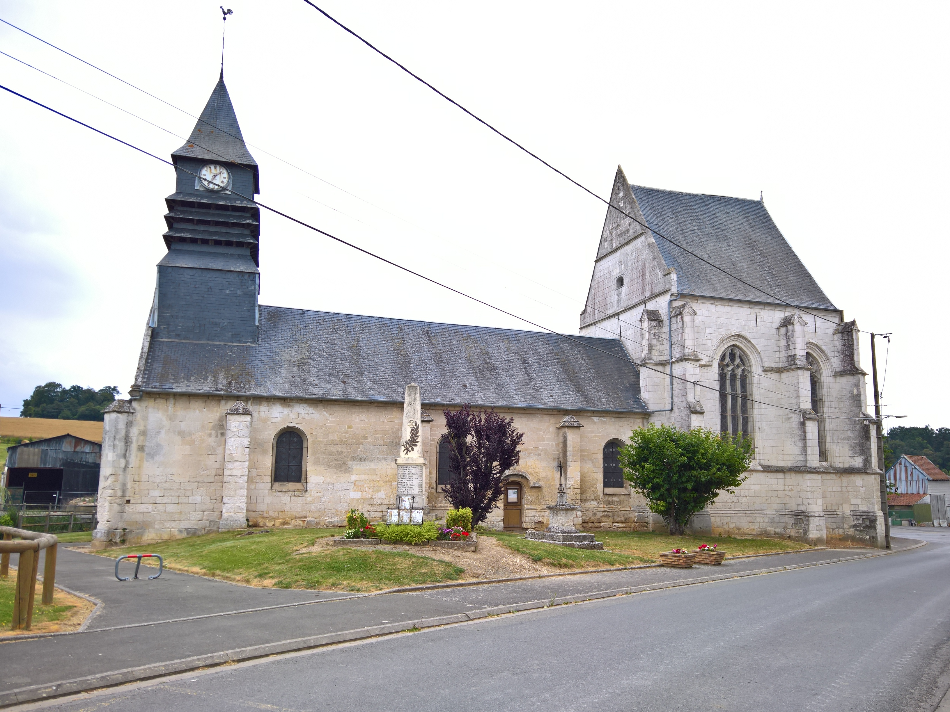 Villers-Vicomte : L'église et le monument aux morts